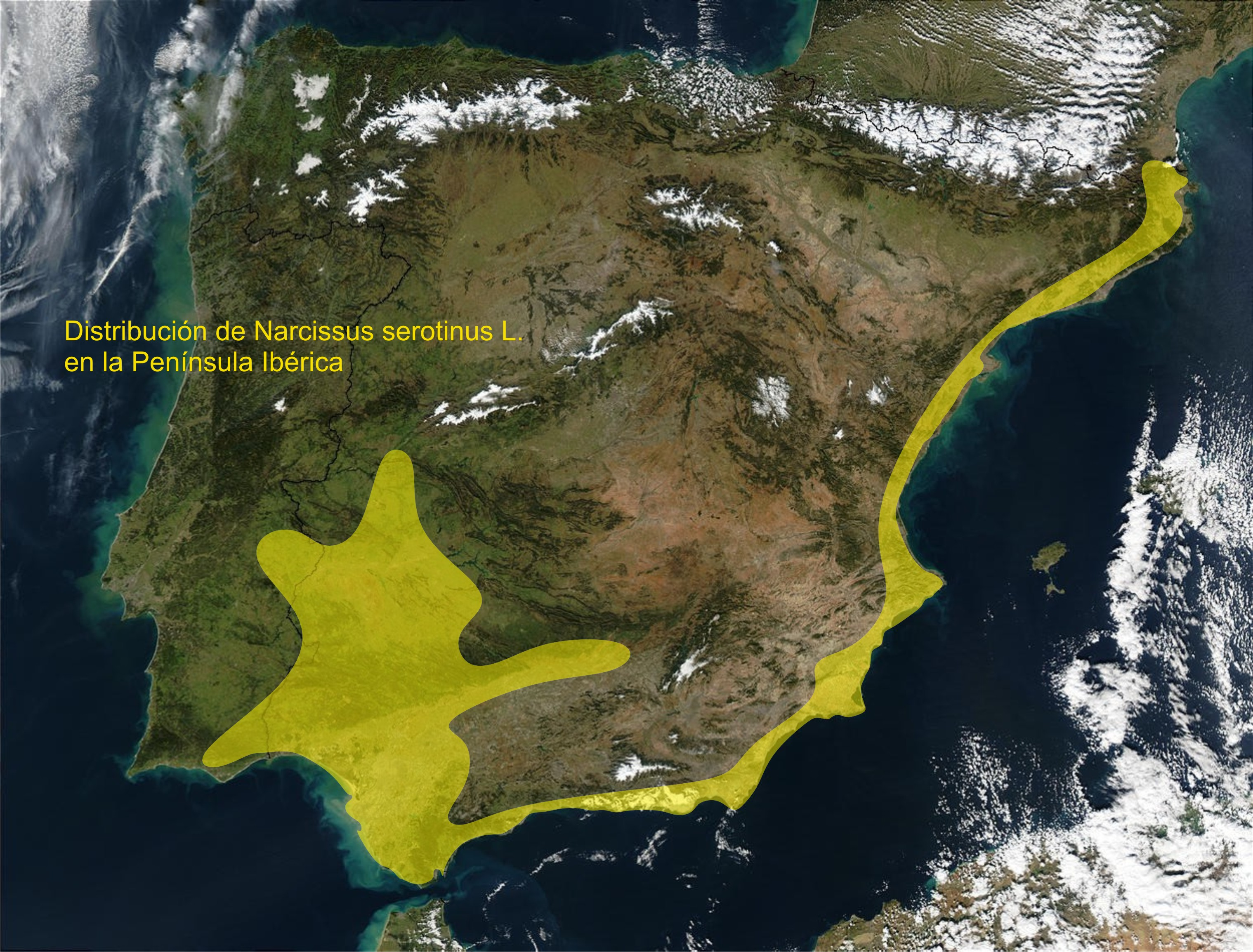 Área de distribución de Narcissus serotinus L. en la Península Ibérica.